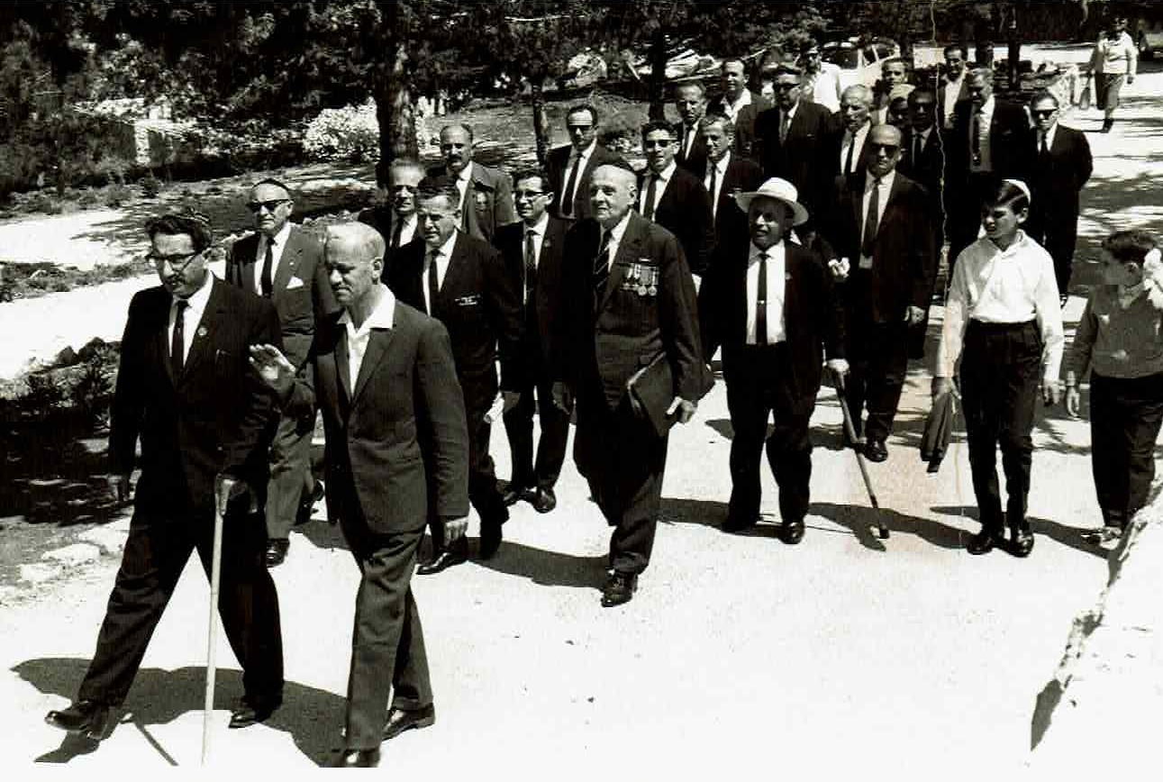 עצרת מחאה של ועד האירגונים של ניצולי השואה נגד האמנת השגריר הראשון של גרמניה בישראל. העצרת התקיימה ליד מצבת הזיכרון לקדושי טרבלינקה בבית הקברות בנחלת יצחק, ביום ט' באב, תשכ"ה, 8 באוגוסט, 1965. בשורה הראשונה צועדים סטפן גראייק, יו"ר ארגון הפרטיזנים ולוחמי הגיטאות (מימין) ויצחק זנדמן, יו"ר ארגון נכי המלחמה בנאצים (משמאל). עוד נראים בין הצועדים יקותיאל טנצר, אריה ובר ואליהו קובנסקי.